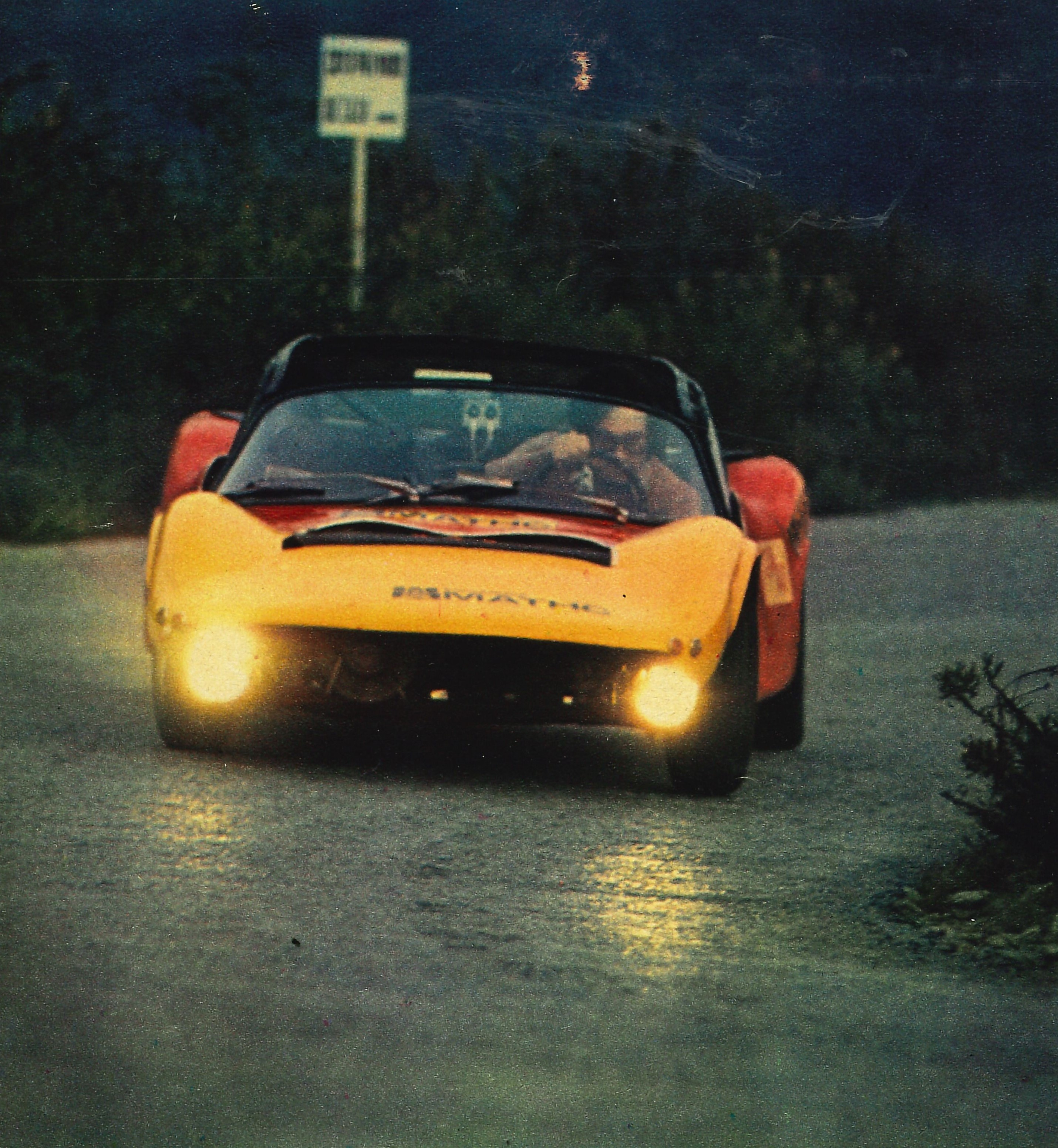 Model MAS 714